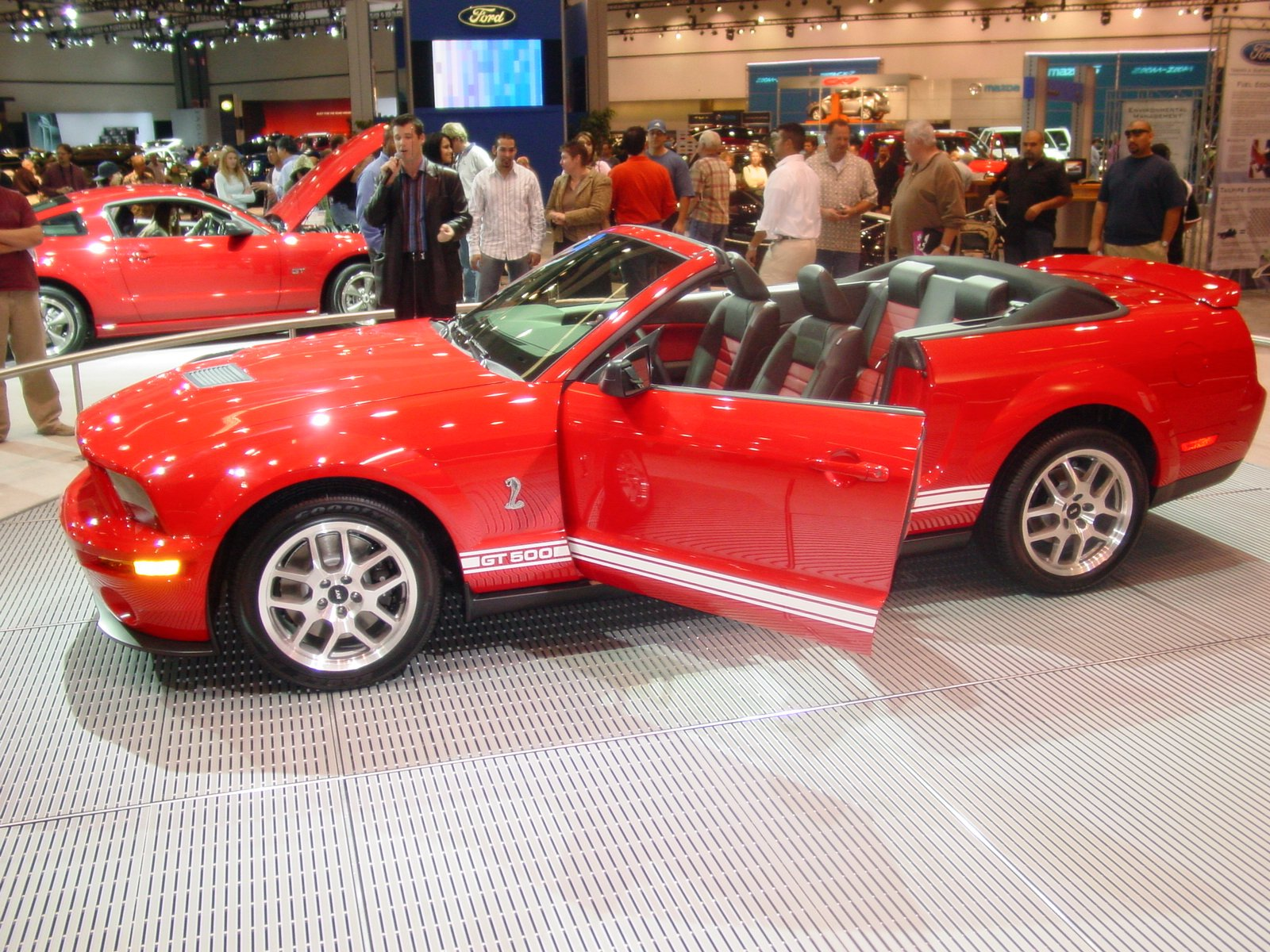 4 gün önce, Los Angeles otomobil fuarında çektiğim; 2007'de çıkması planlanan Ford Shelby GT500. Resimde de gözüken sunucu, üretilen ilk yüz adedinin "müzelenme" sebebiyle hiç bir zaman satılmayacağını; bu sebeple de otoban da hiç kullanılmayacağını anlatıyordu.